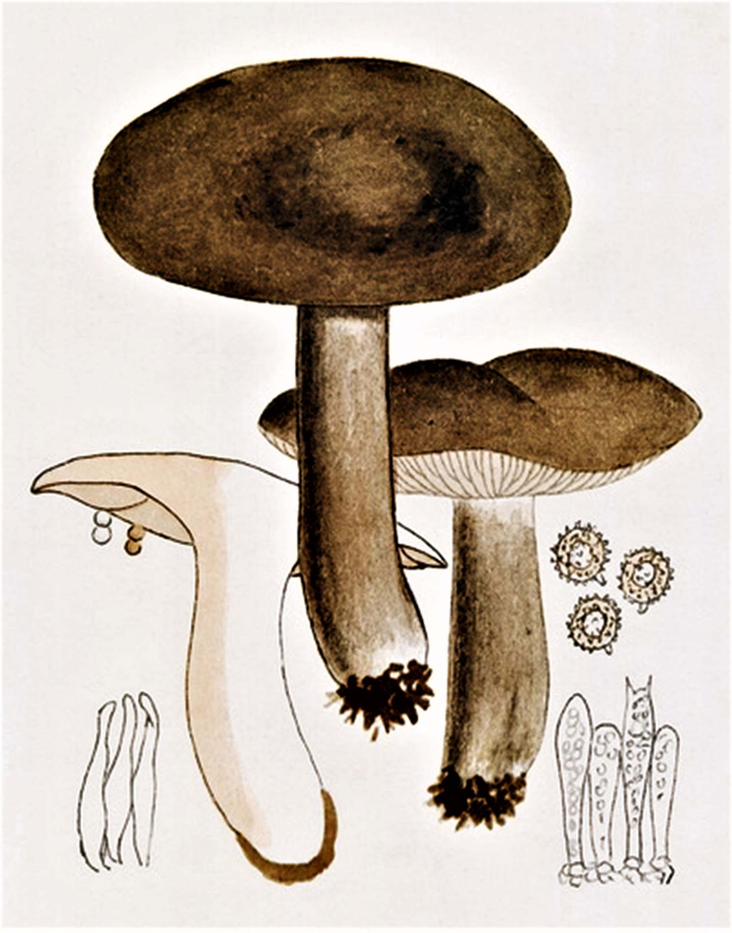 Giacomo Bresadola: Lactarius fuliginosus Fr. (1838)